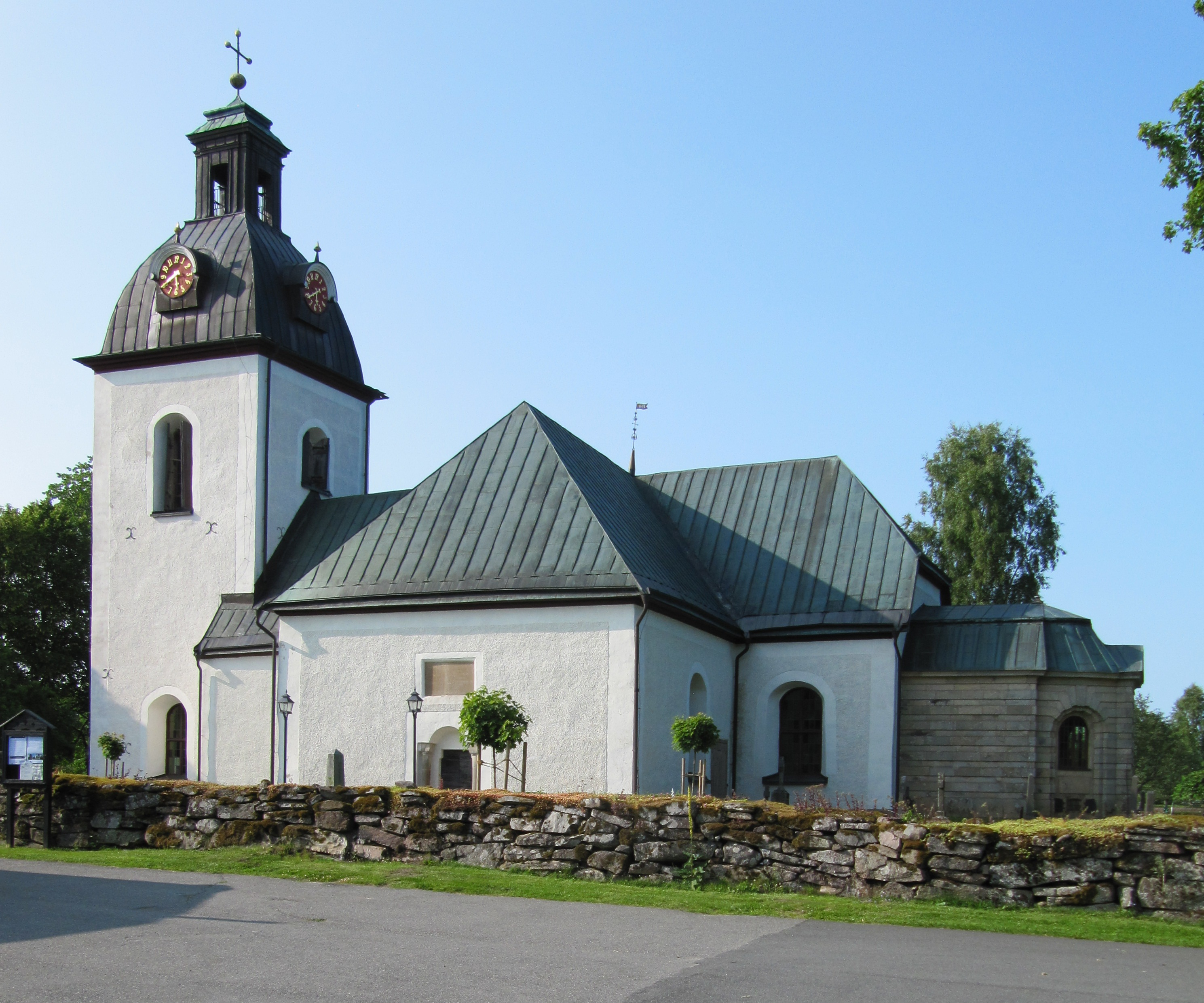 Byarums kyrka